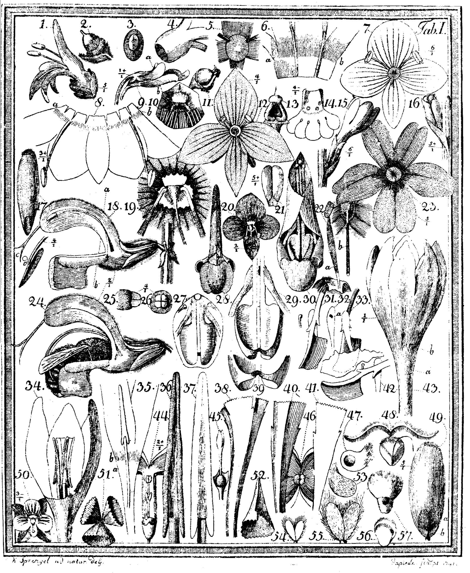 Abbildung aus Christian Konrad Sprengel: “Das entdeckte Geheimnis der Natur im Bau und der Befruchtung der Blumen”,1793